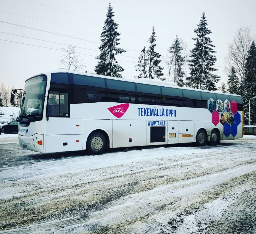 Entinen Netti-Nysse/Ratikka-Nysse nykyisessä ulkoasussaan Tampereen aikuiskoulutuskeskuksen opetusautona.